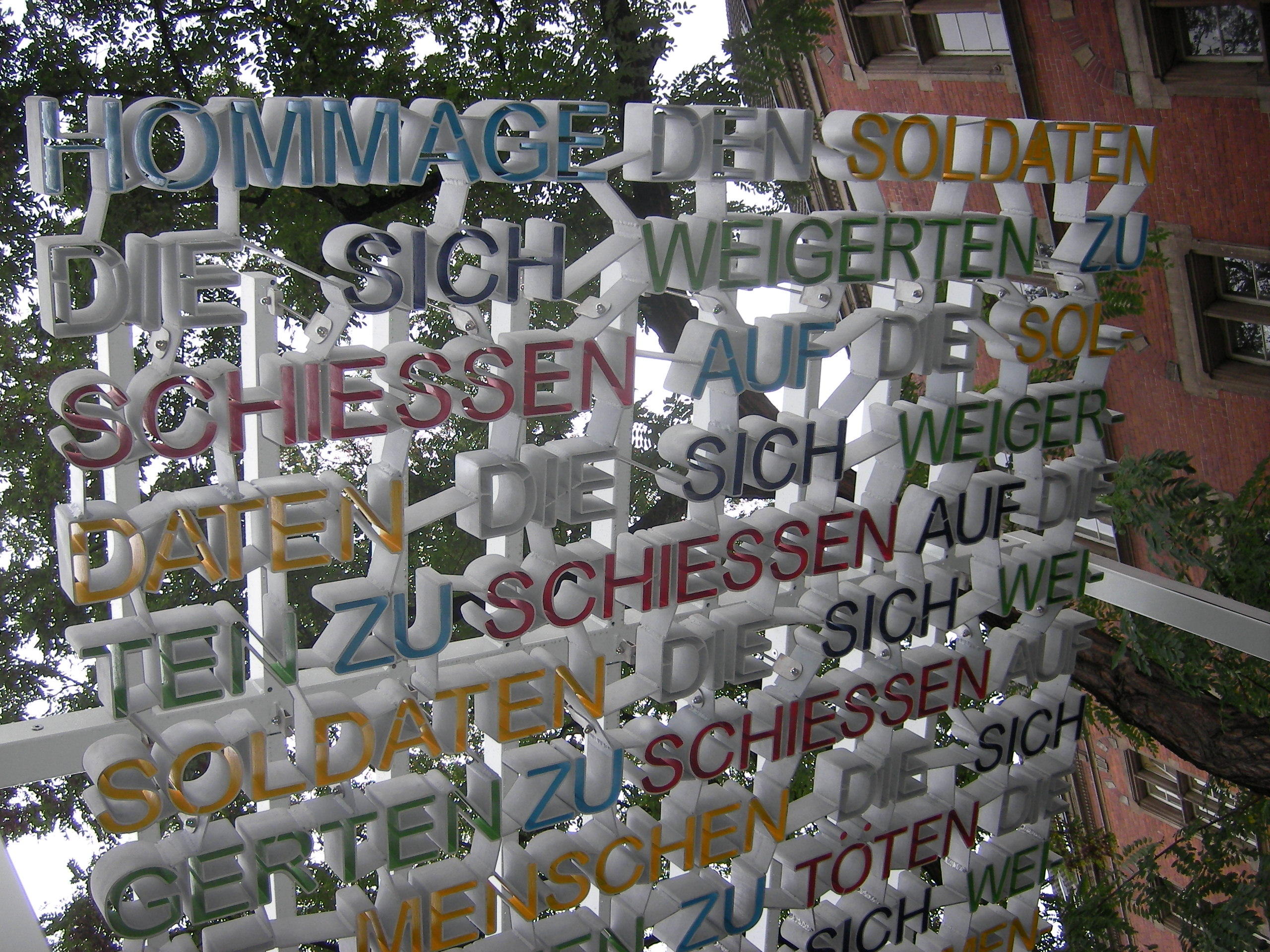 Das Deserteur-Denkmal am Appellhofplatz in Köln erinnert an diejenigen Soldaten des NS-Regimes, die den Befehl zu töten verweigert haben. (Ansicht von unten.)